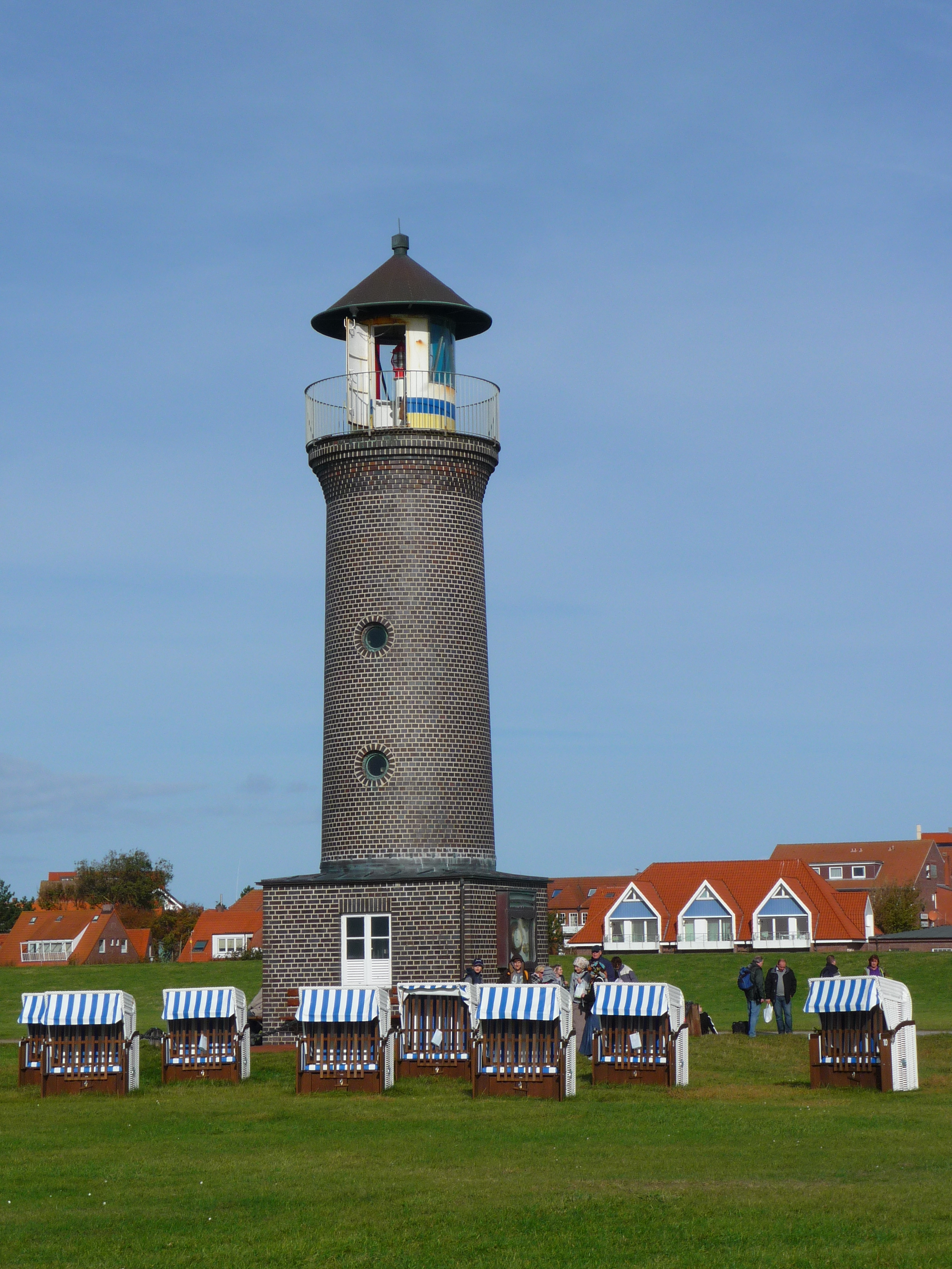 Leuchtturm mit Memmert-Feuer auf der ostfriesischen Nordseeinsel Juist (Niedersachsen, Deutschland)